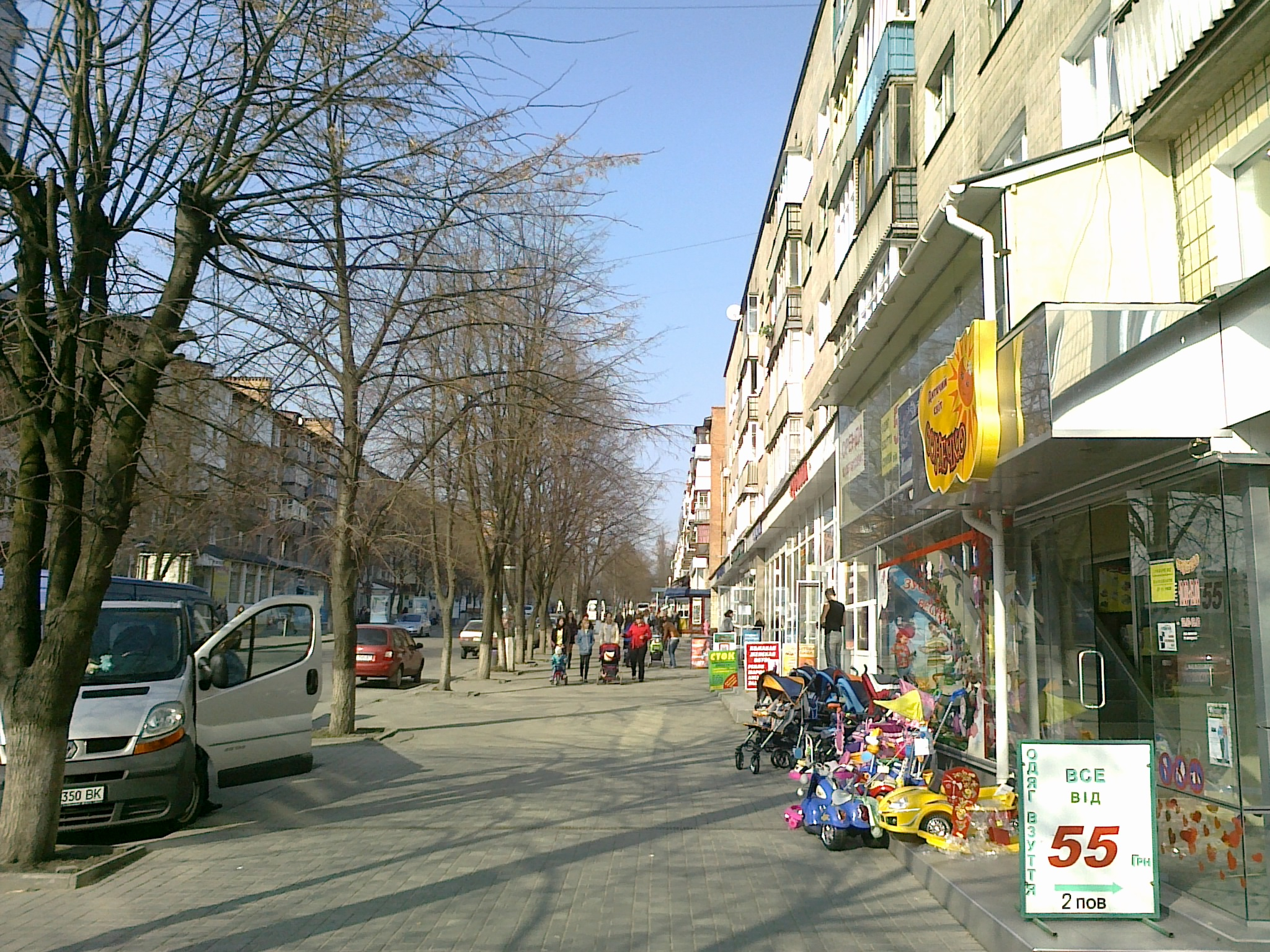 Вулиця Олеся Гончара (Біла Церква) 1